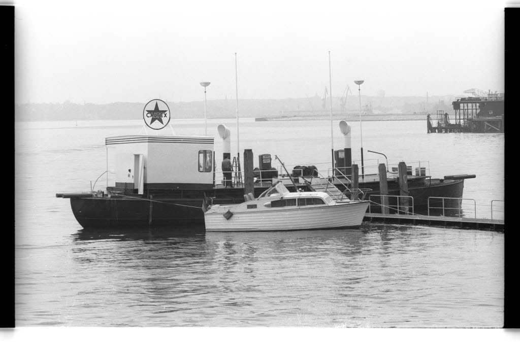 vor dem Skagerrakufer von Friedrichsort.